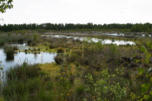 Renaturierungsflächen auf ehemaligem Torfabbau im Naturschutzgebiet Göldenitzer Moor, Mecklenburg-Vorpommern.